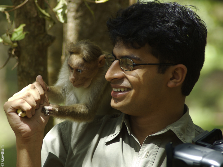 Kalyan Varma at BR Hills/K Gudi, Karnataka, India